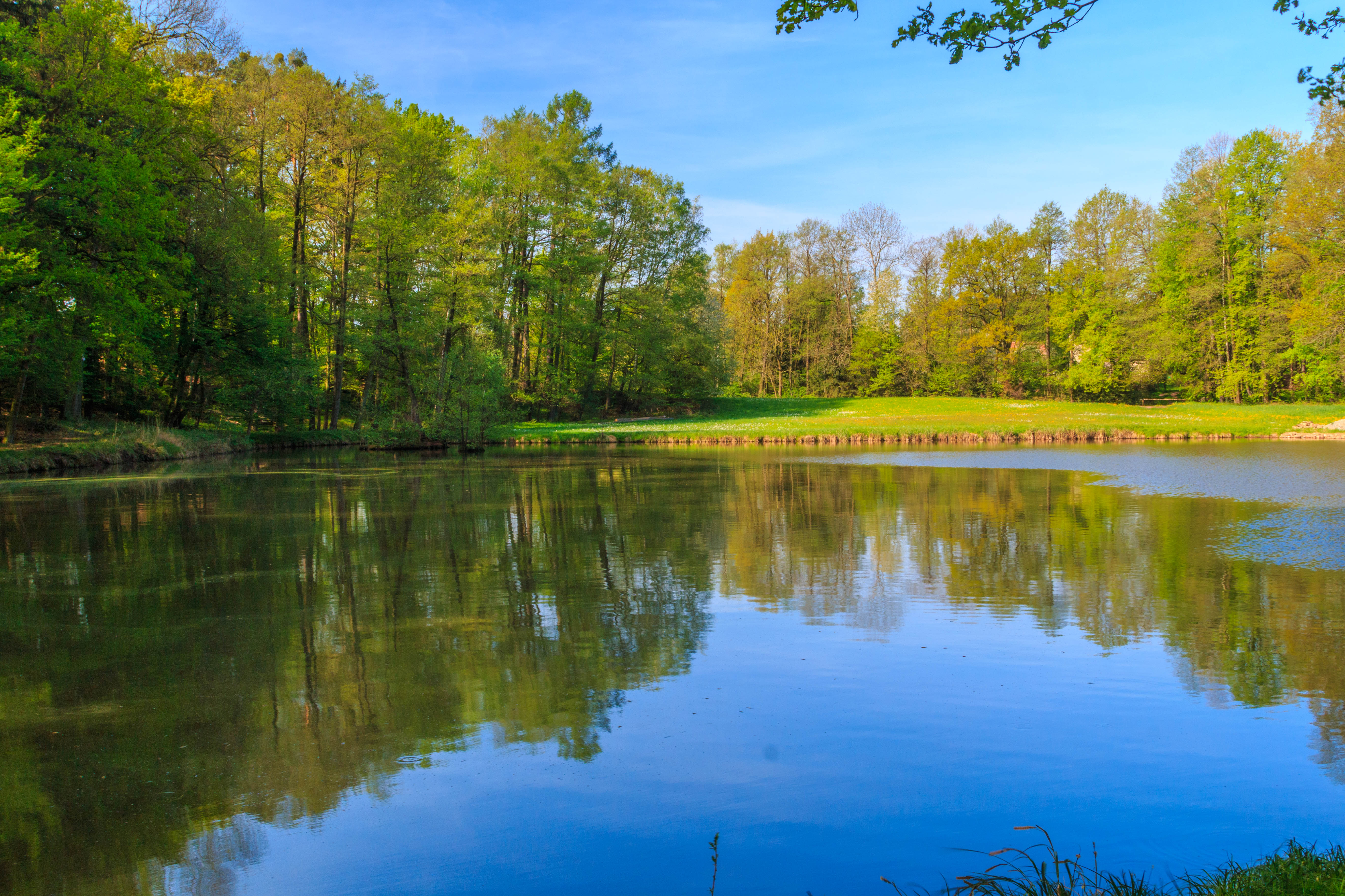 Ledecký rybník Project: Vodstvo.